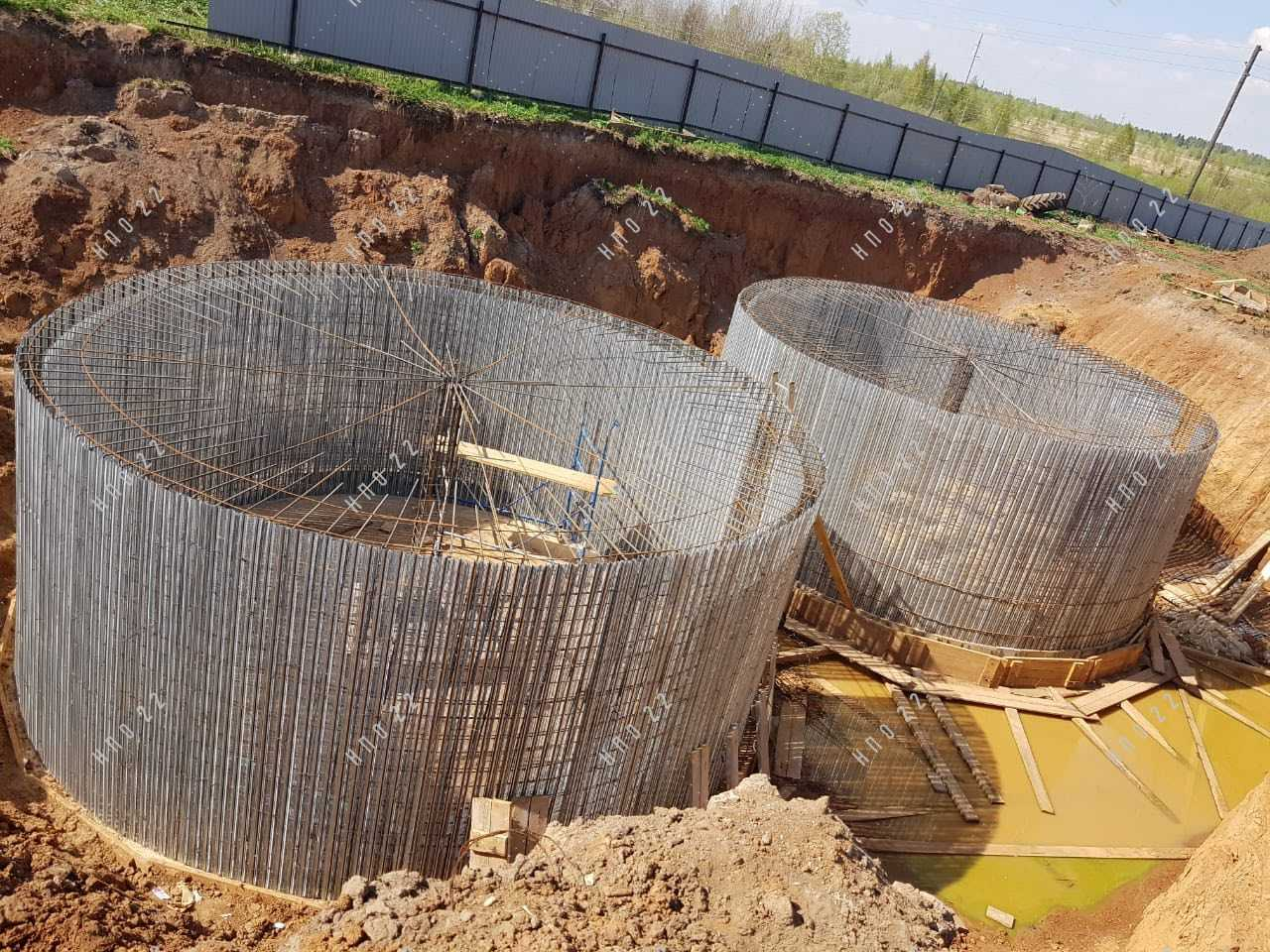 Резервуары из опалубки Proster®21